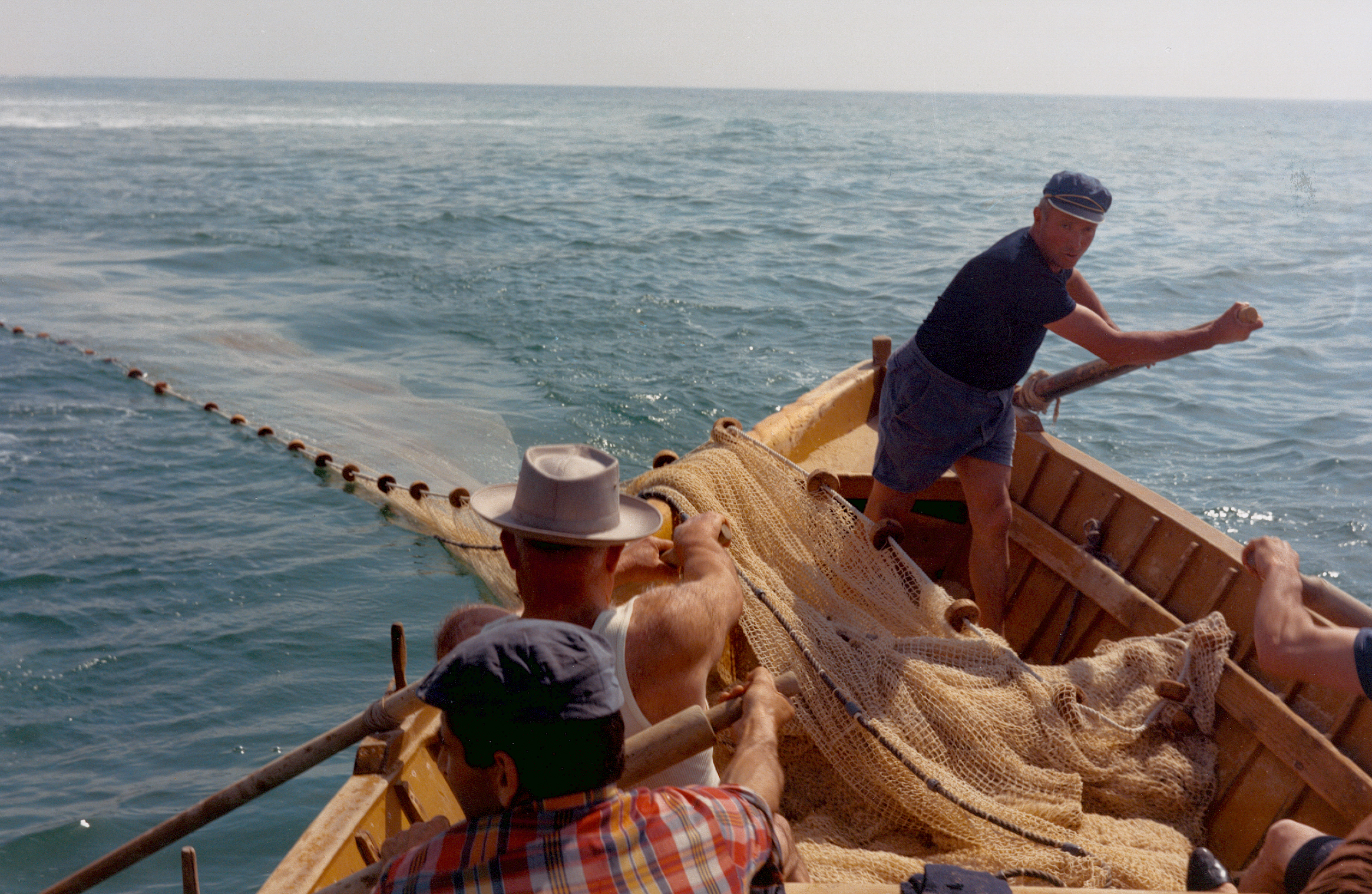 Pêche à la pinasse, Cap de l'Homy, Lit-et-Mixe, France